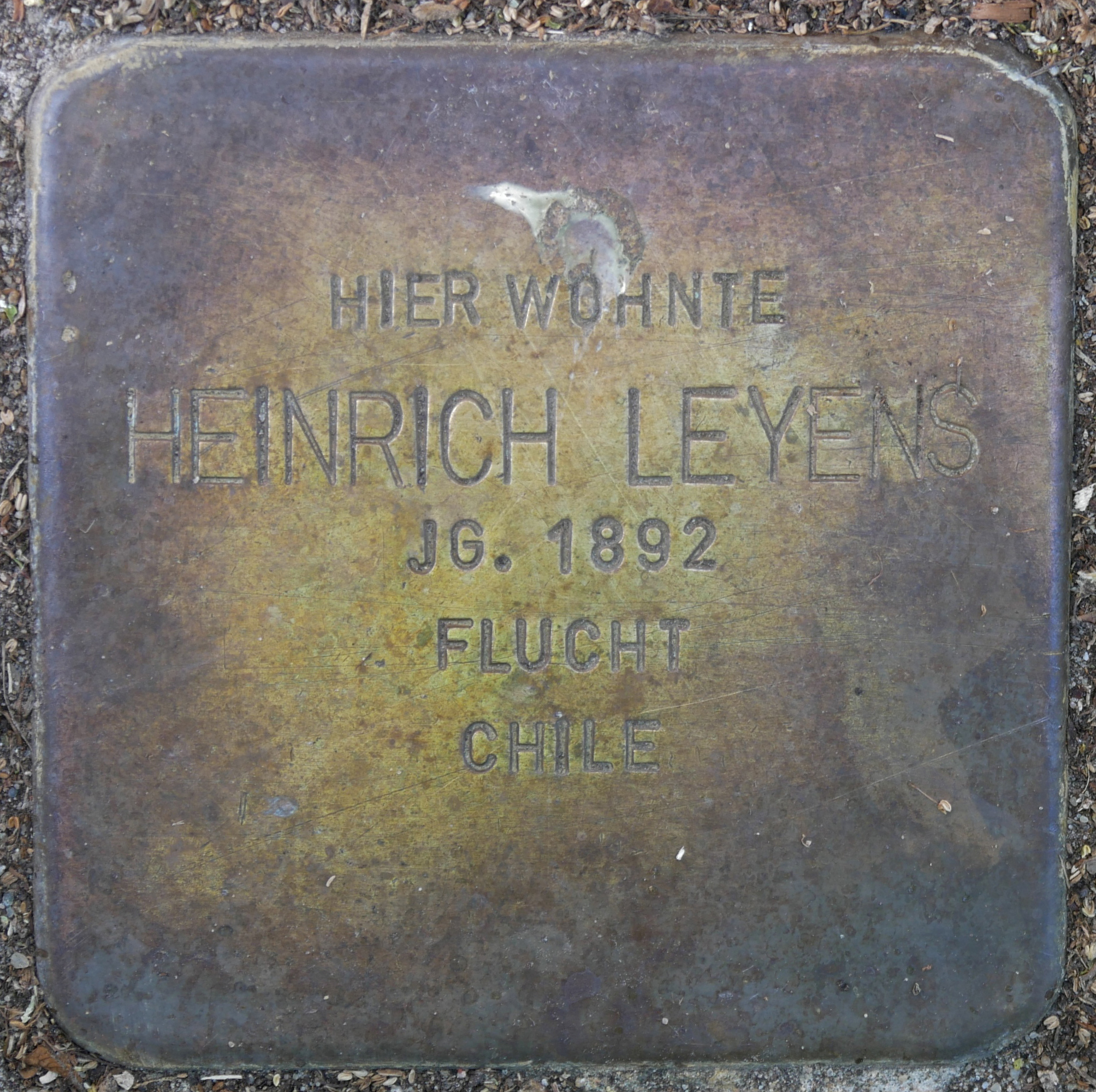 Stolpersteine Wesel: Leyens, Heinrich